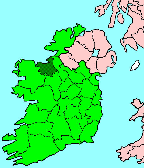 Sligo